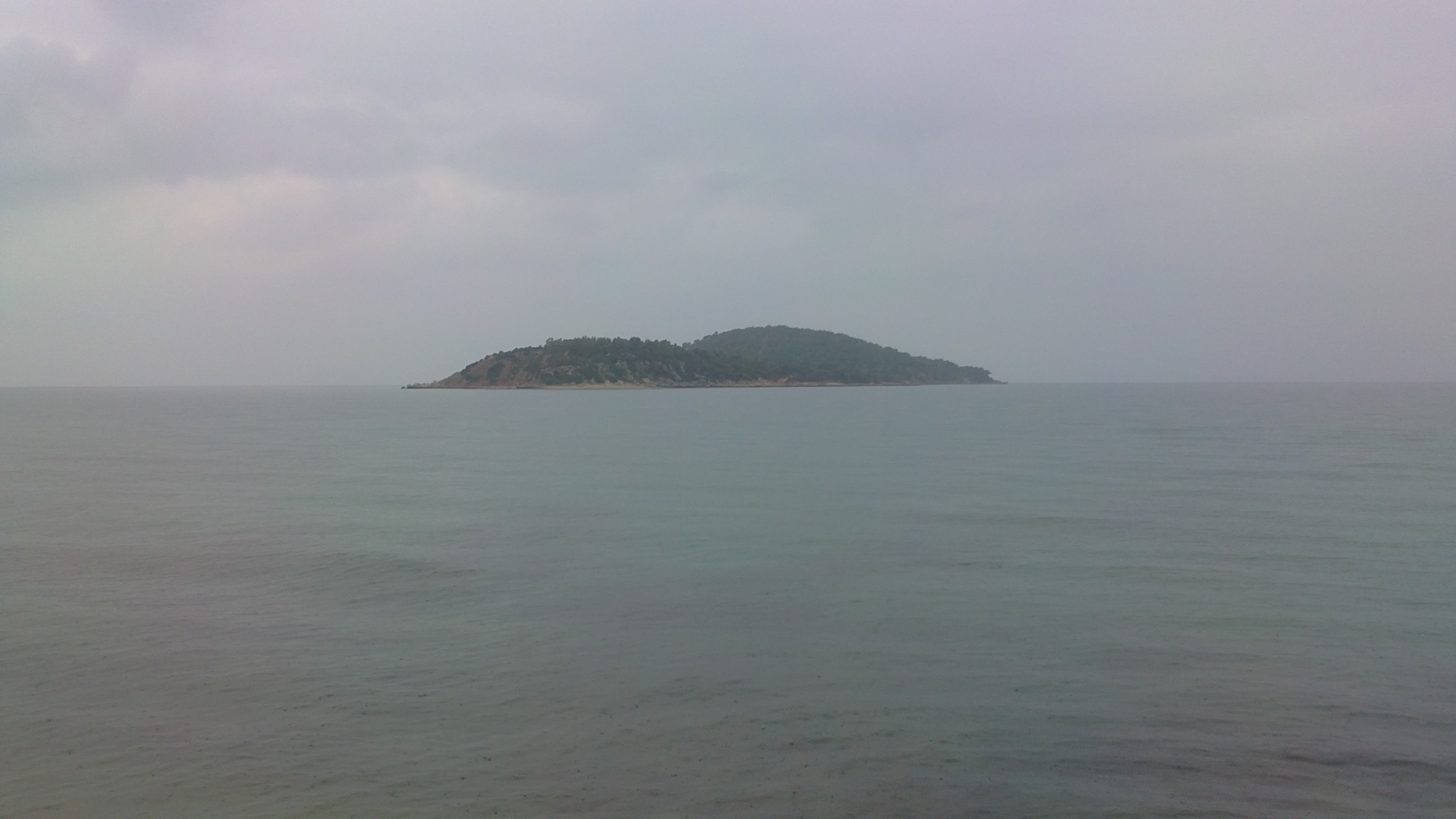 Το Εγγλεζονήσι Ευβοίας